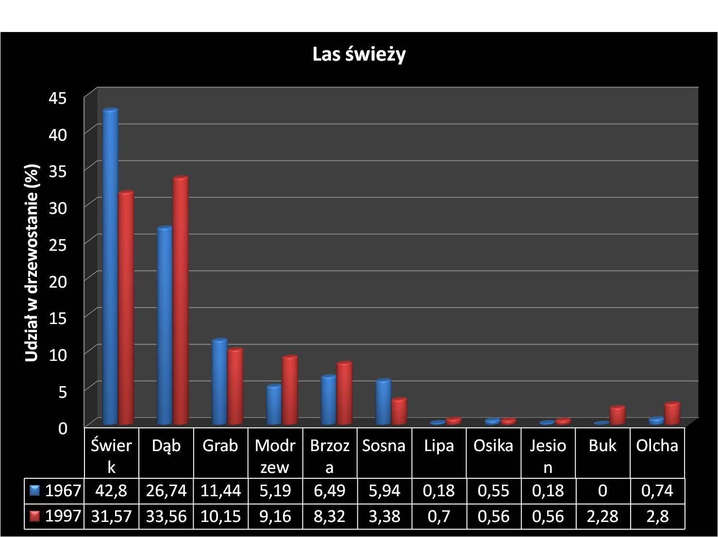 Autor: Adrian Grzegorz